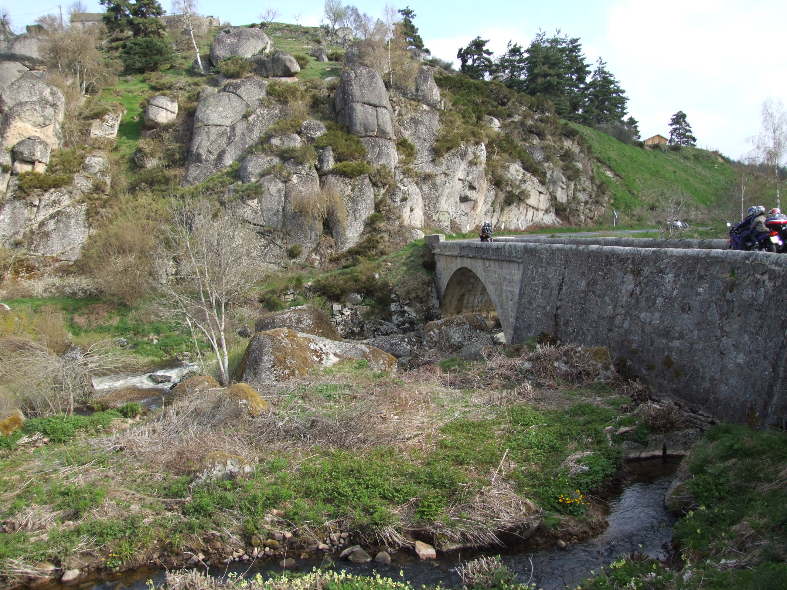 An der Limagnole westlich St- Alban-sur-Limagnol